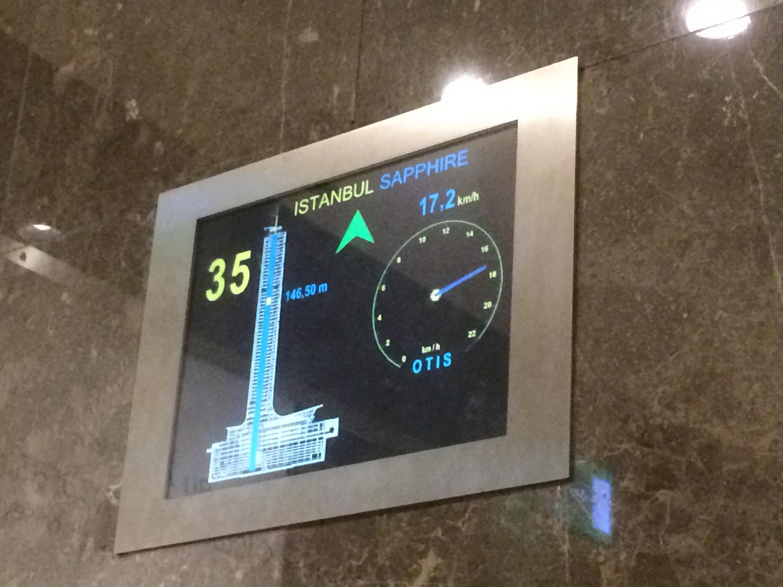 Anzeige des Aufzugs zur Aussichtsplattform Sapphire Tower of Istanbul